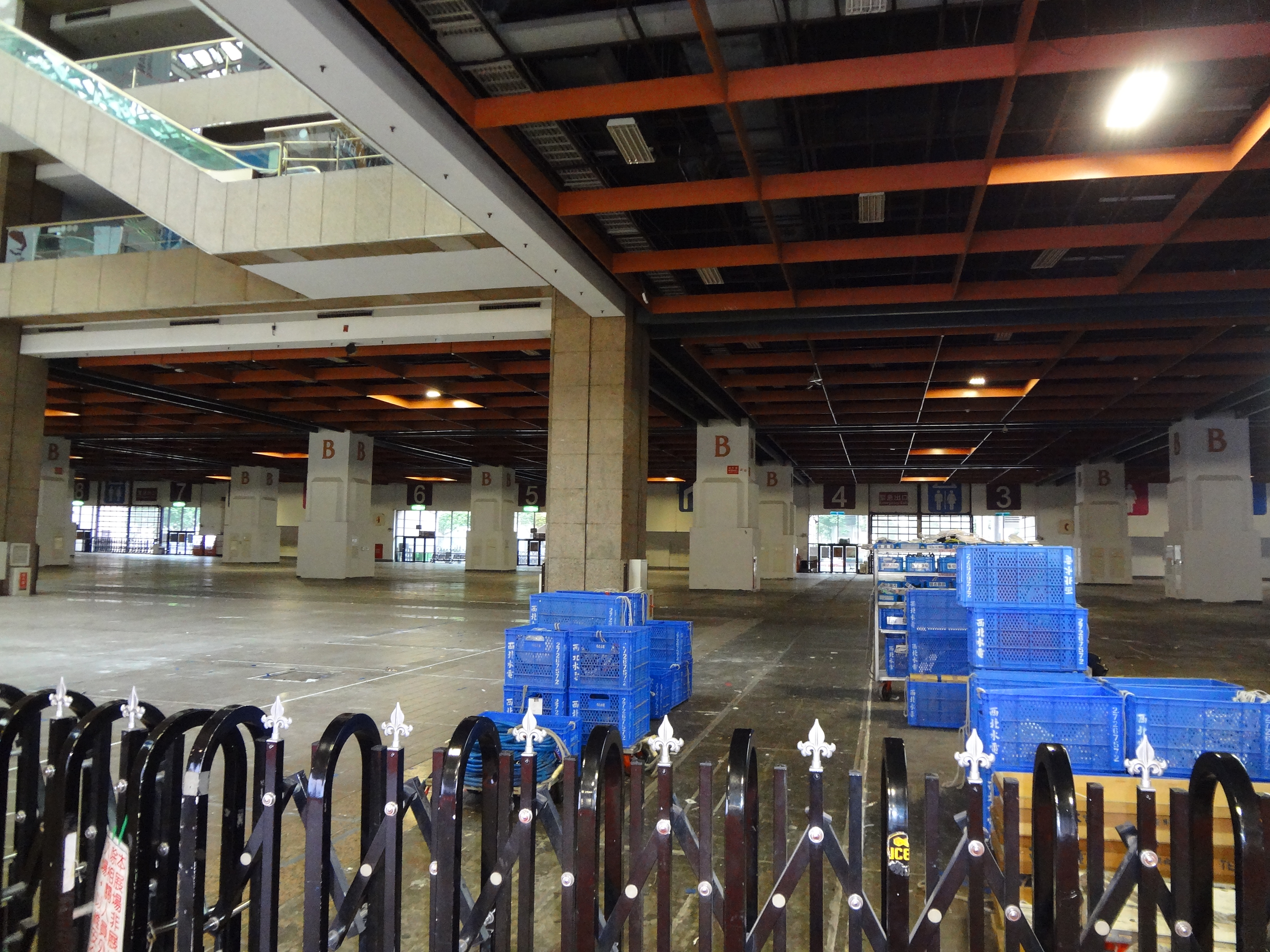 中文（台灣）: 台北世界貿易中心展覽大樓1樓展場B區，拍攝時無展覽。